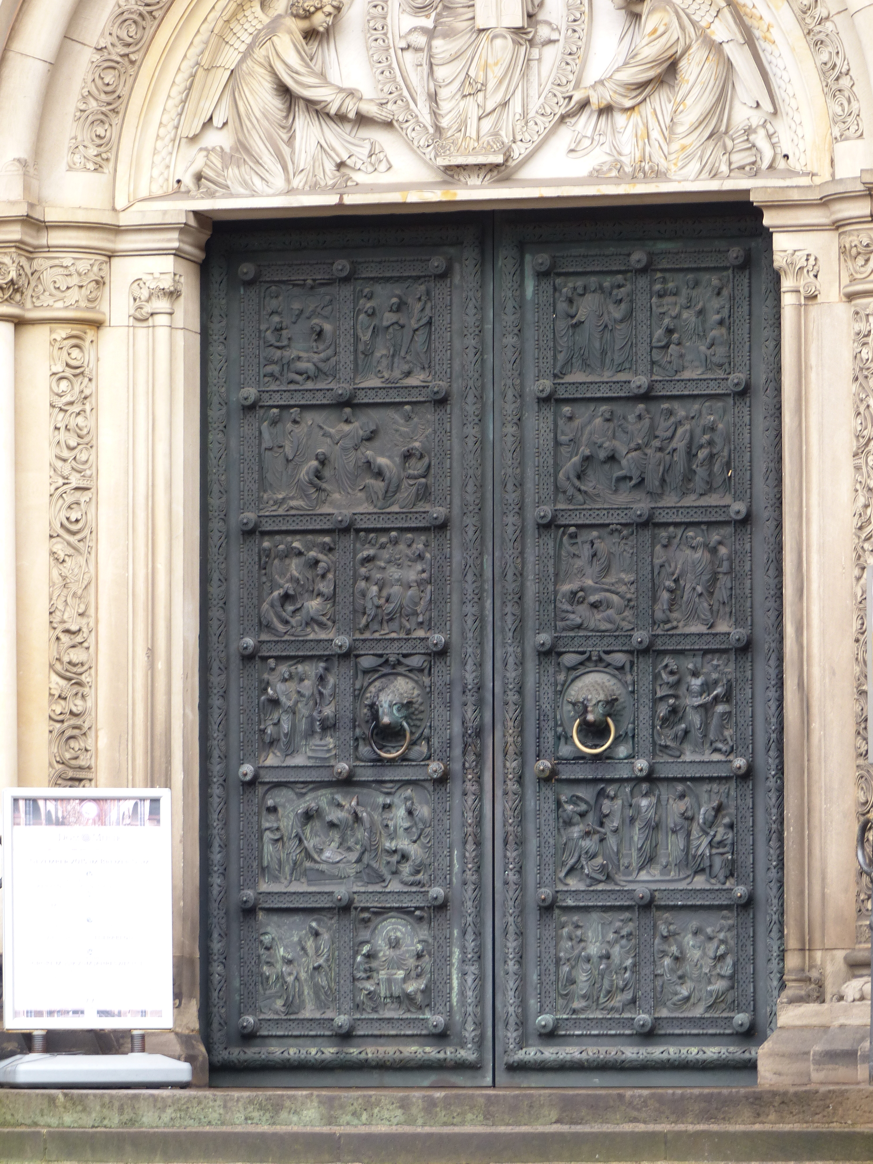 Rechtes Westportal des Bremer Doms, geschlossene Türflügel und etwas Gewände